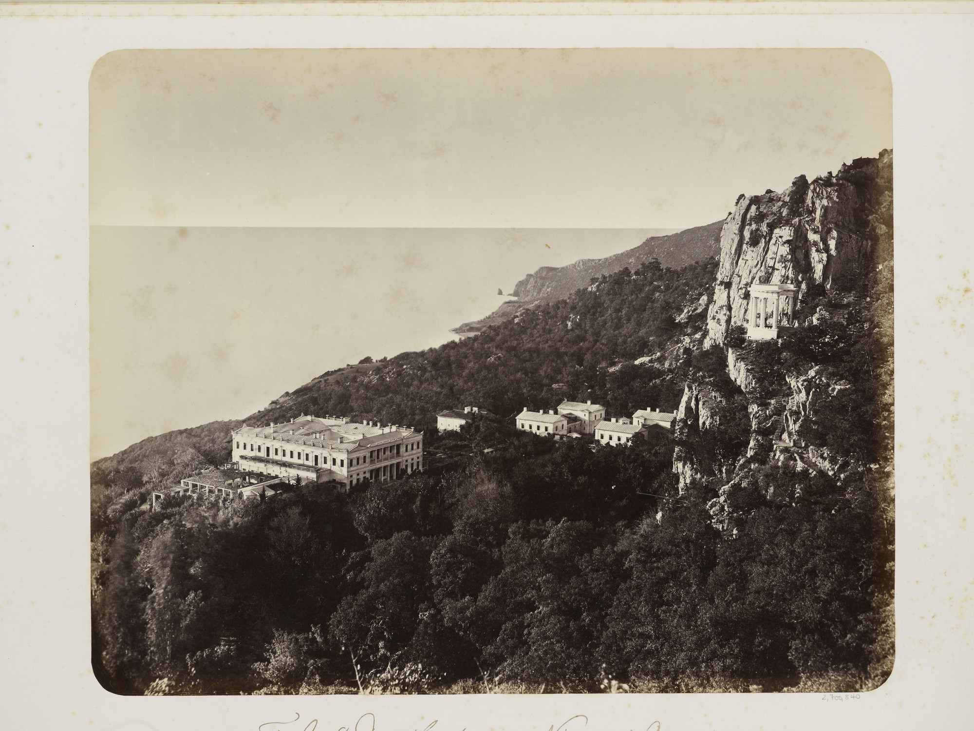 Крым